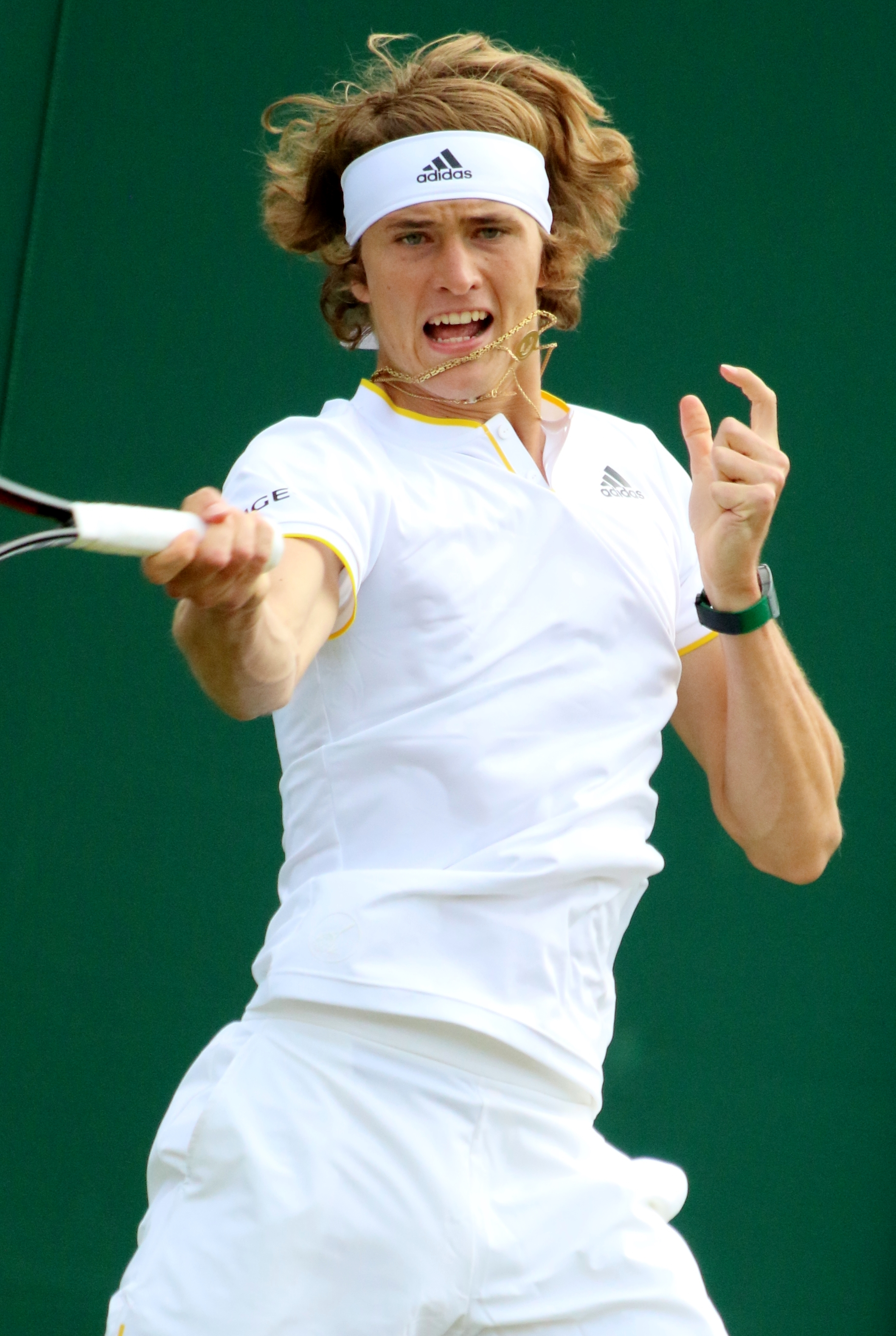 Zverev A. WM17 (55)